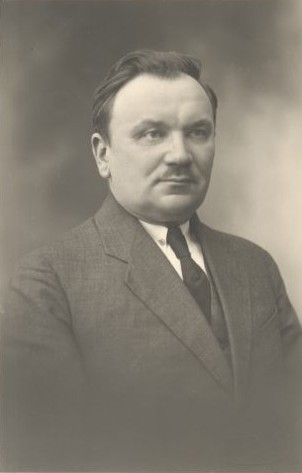 Taavet Rootsmäe, eesti astronoom